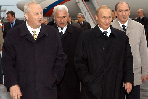 Владимир Путин прибыл в Екатеринбург для проведения переговоров с канцлером ФРГ Герхардом Шрёдером